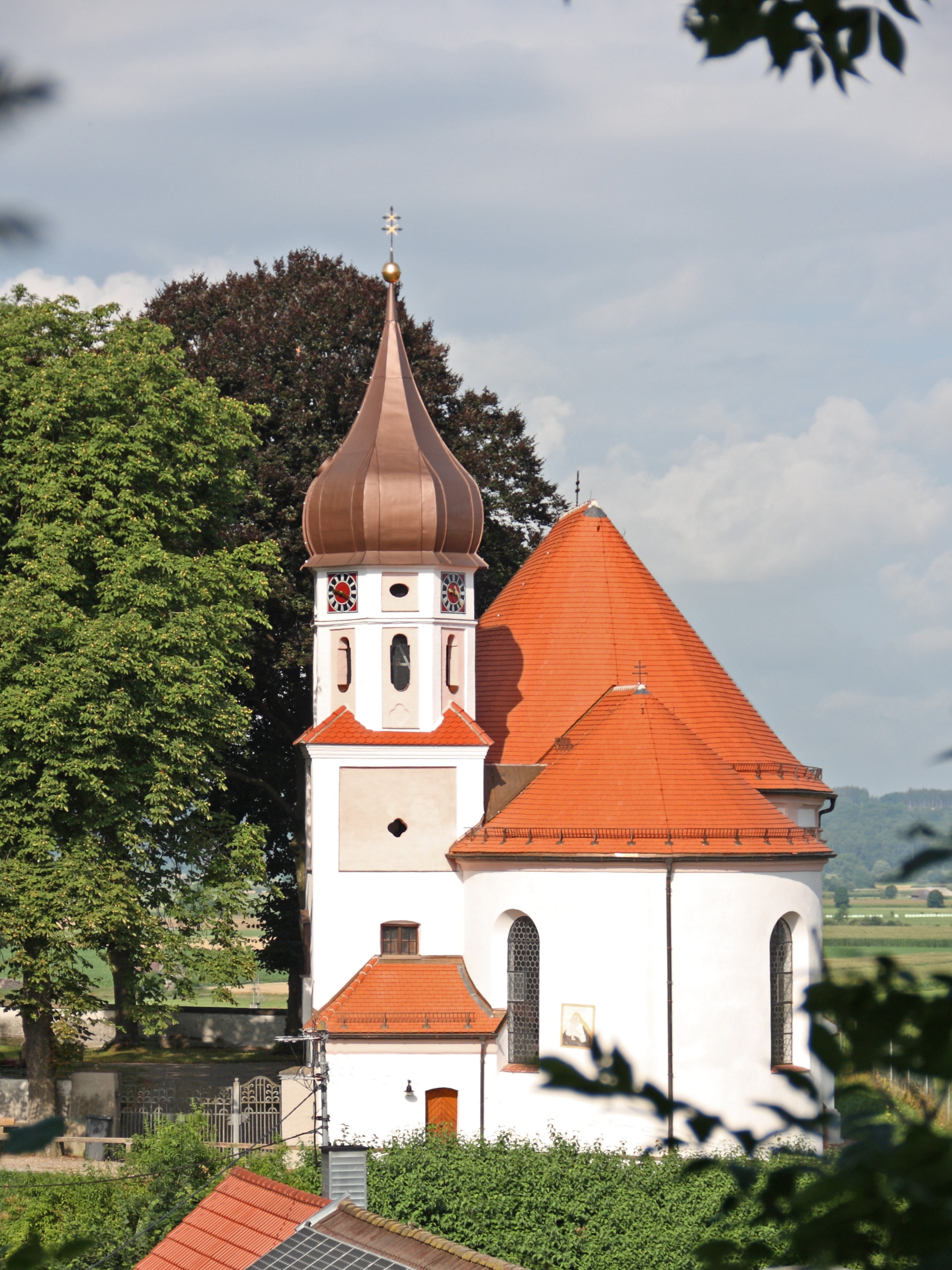 Ostansicht der Kirche